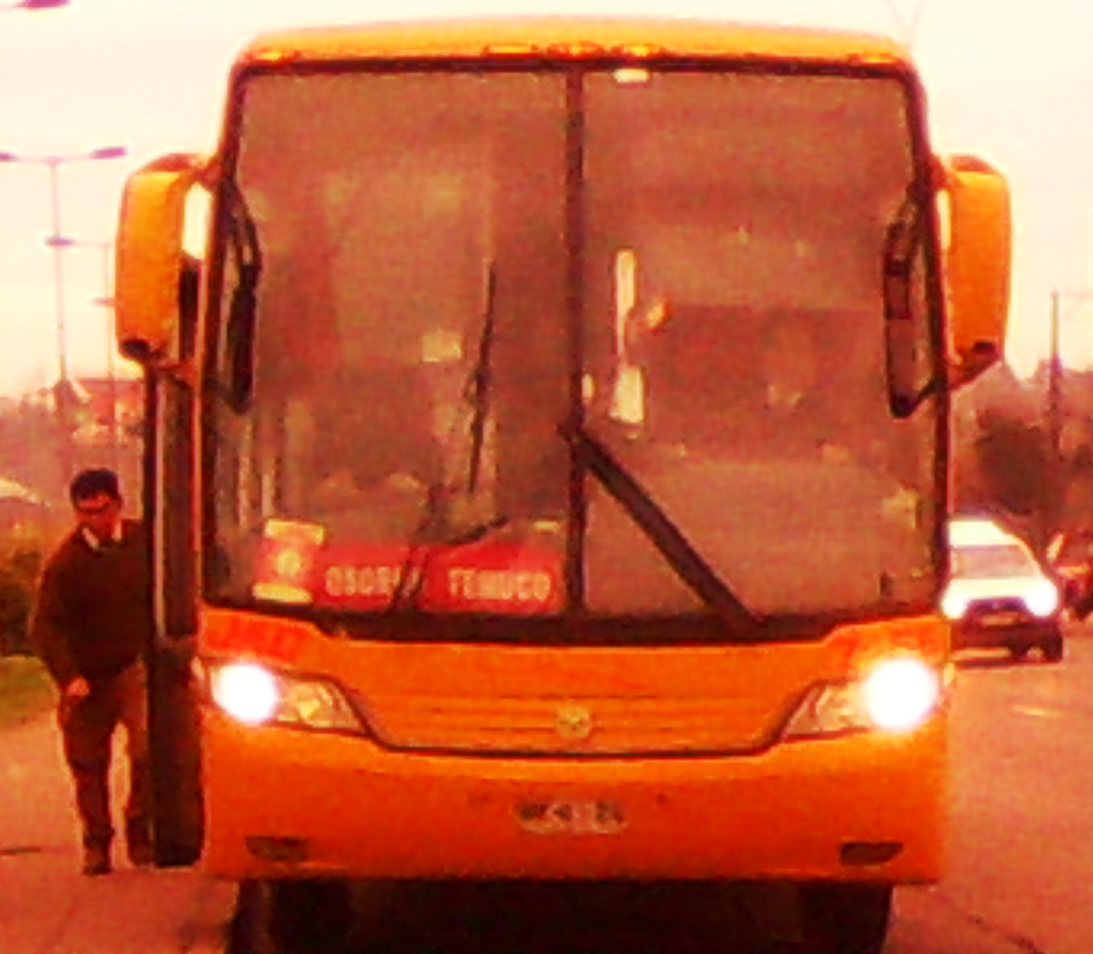 Bus JAC en la avenida Caupolicán de Temuco, Chile.